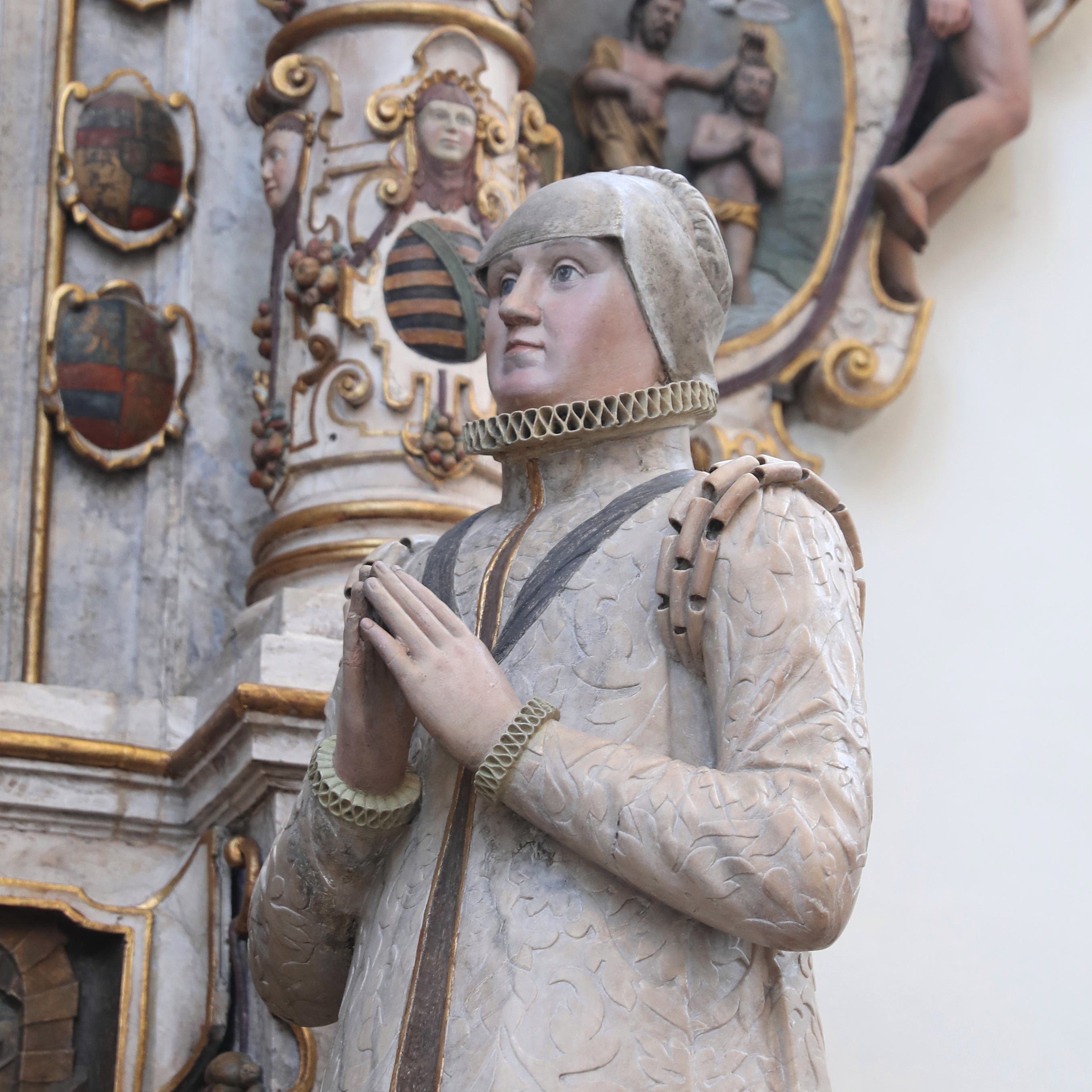 Herzogin Elisabeth von Sachsen, Alabaster-Epitaph, in Morizkirche Coburg